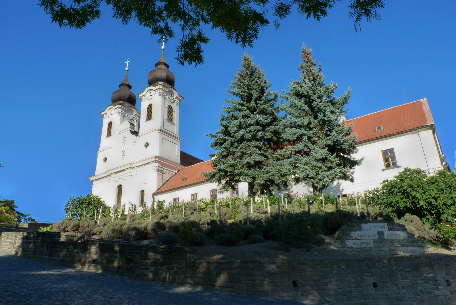 Apátsági templom (Tihany, Batthyány u. 34.) This is a photo of a monument in Hungary. Identifier: 10483